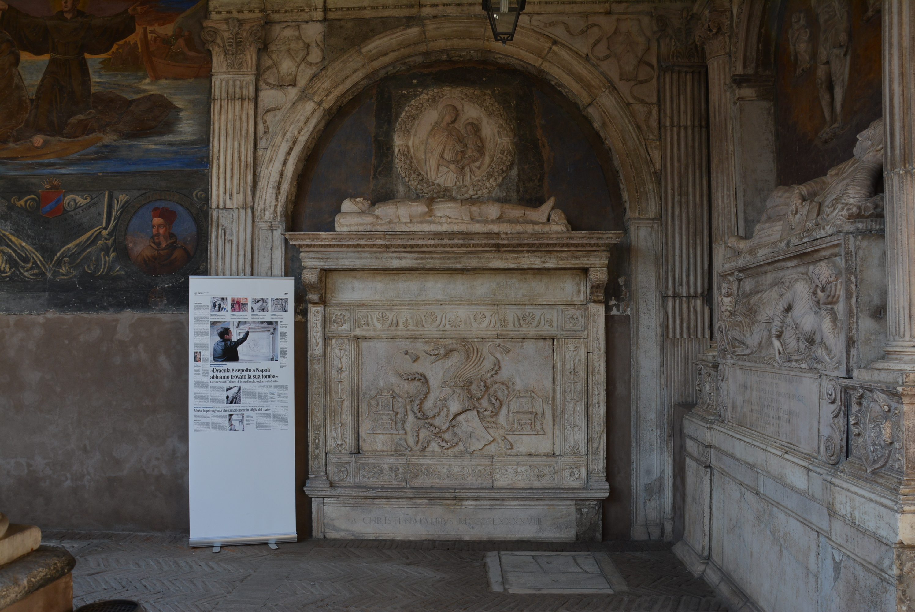 Chiostro piccolo della chiesa di Santa Maria la Nova a Napoli